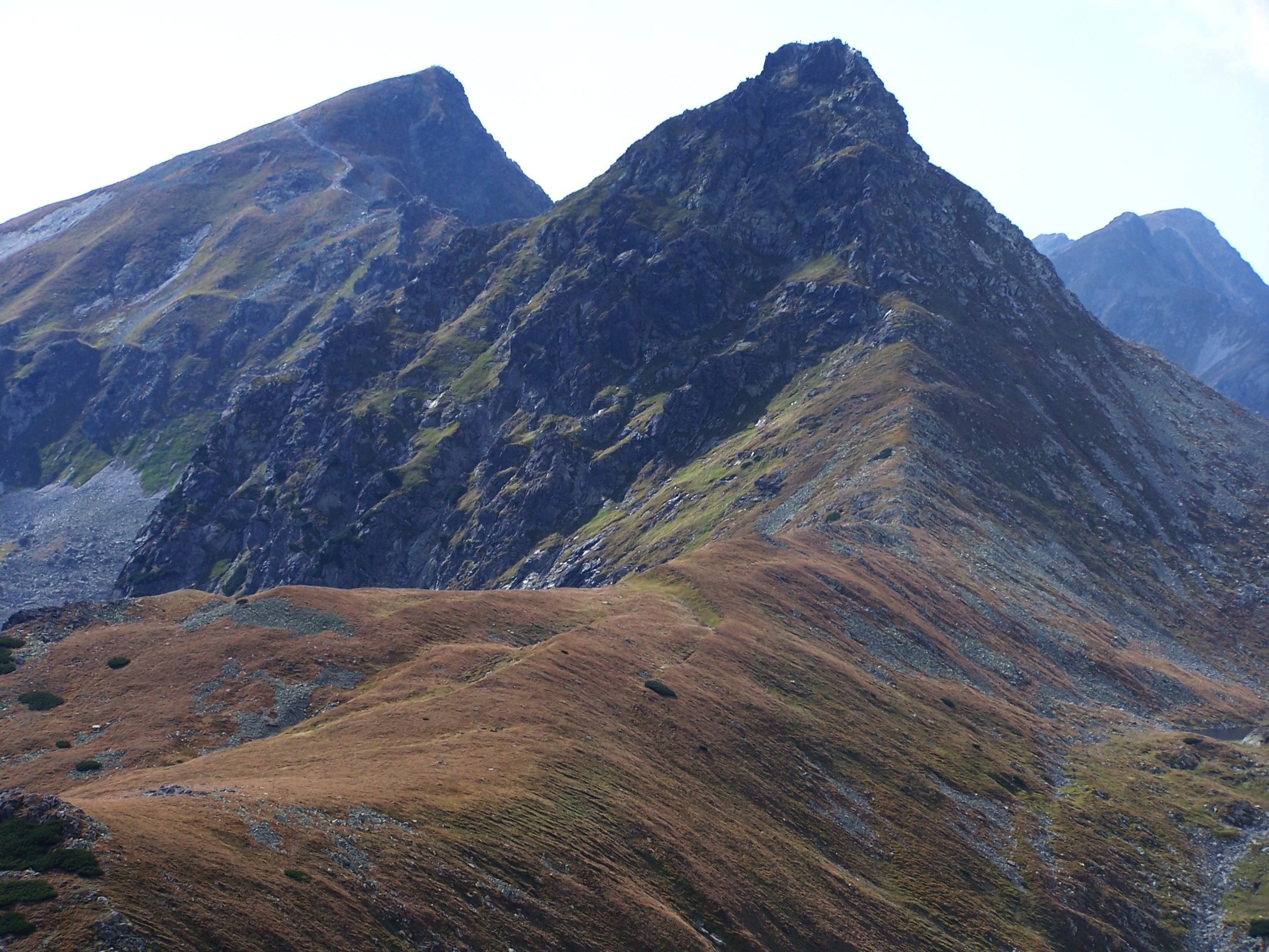 Płaczliwy Rohacz, Ostry Rohacz -West Tatra Mountains